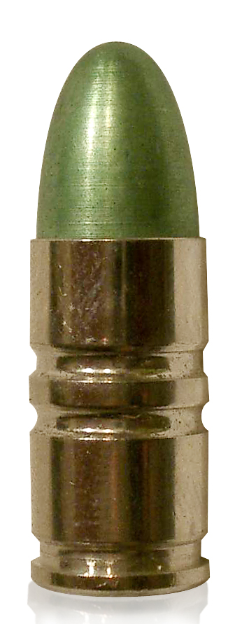 9 × 19-mm-Exerzierpatrone. 9mm Exerzierpatrone.